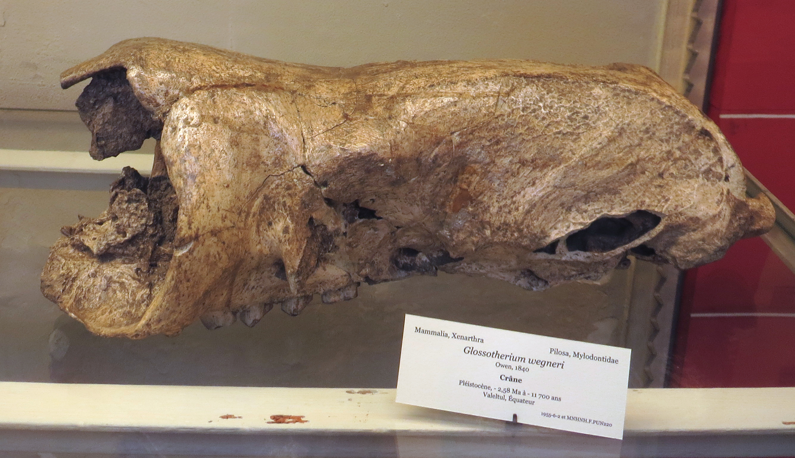 Skull of Glossotherium